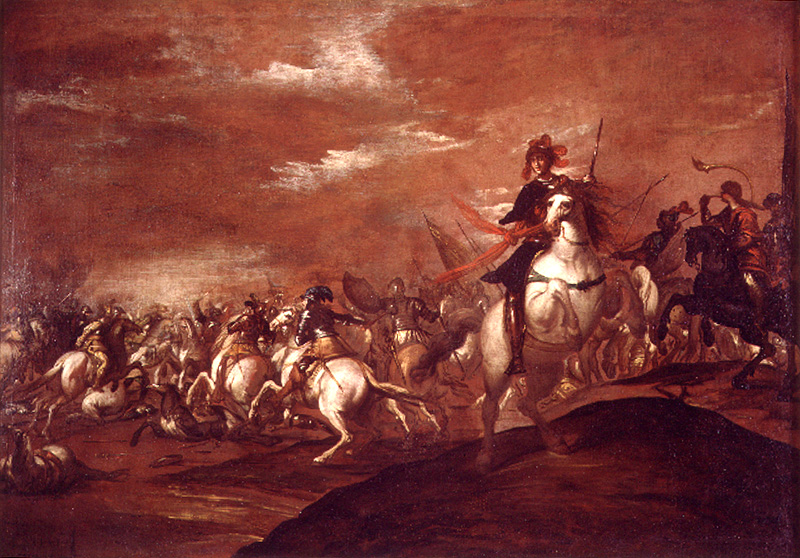 La obra representa una batalla entre dos grupos de caballería.